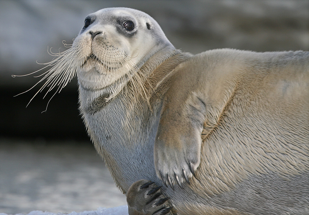 Bartrobbe (Erignathus barbatus) auf Spitzbergen